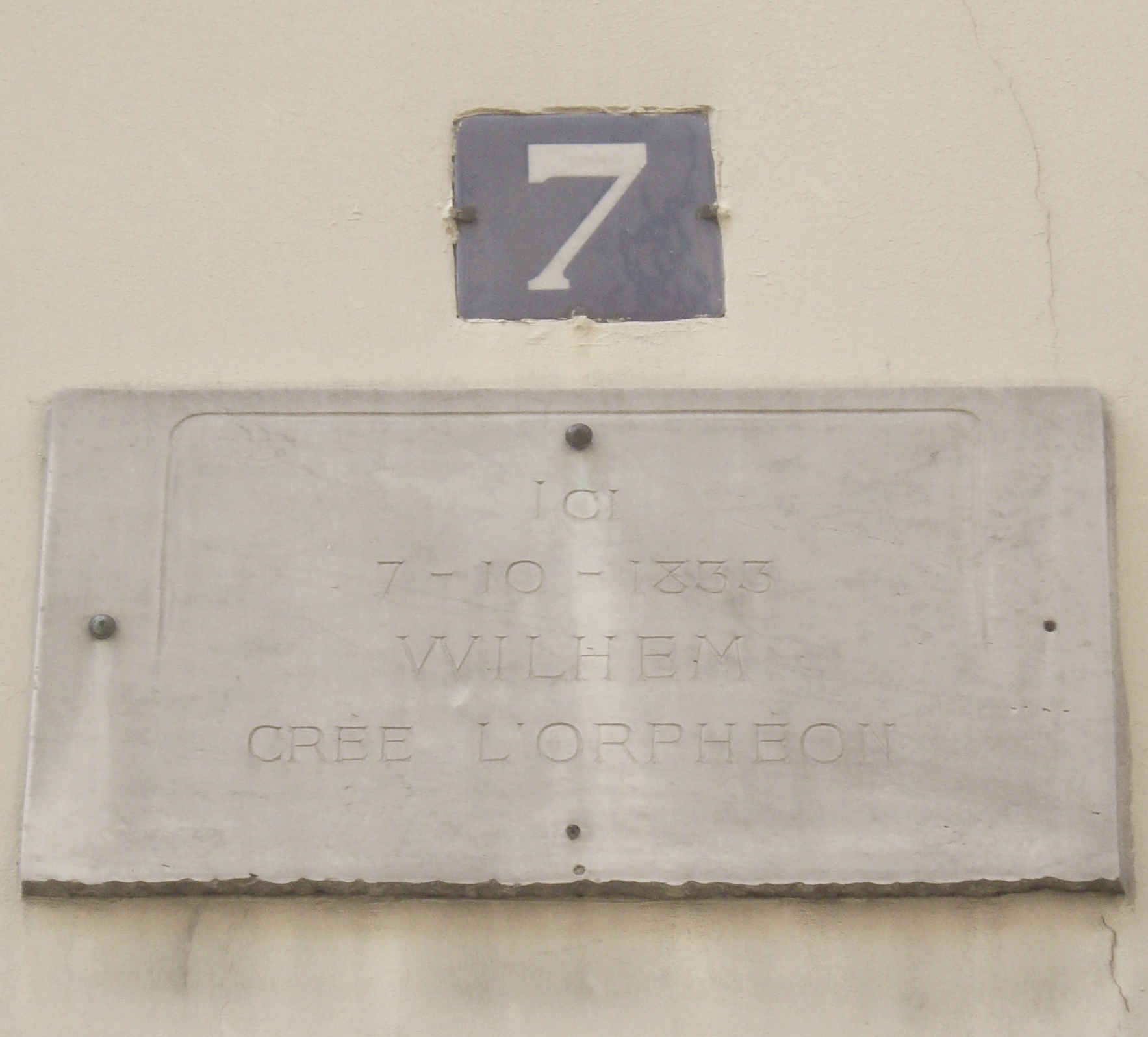 Plaque commémorative, 7 rue Pecquay, Paris 4e. « Ici, 7.10.1833, Wilhem crée l'Orphéon. »